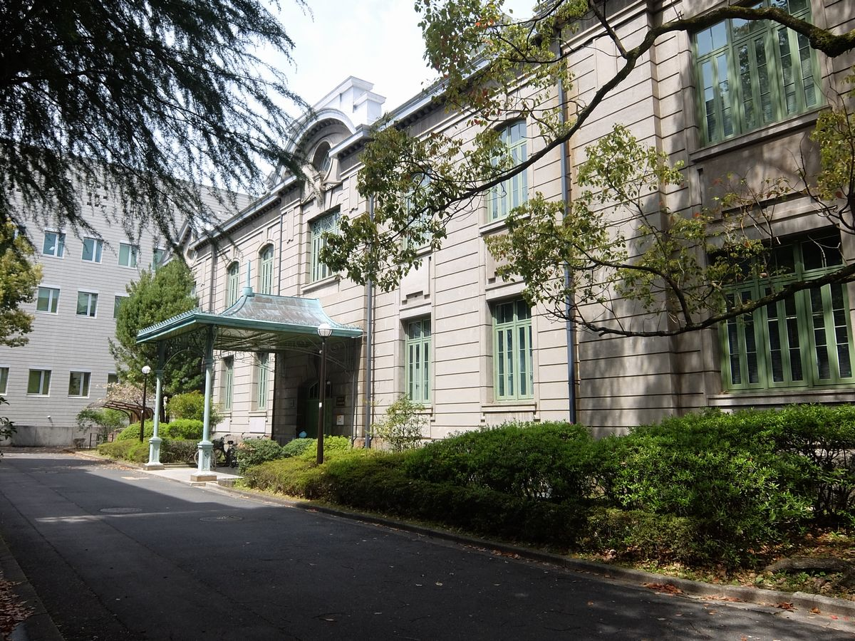 京都大学本部構内にある文学部陳列館